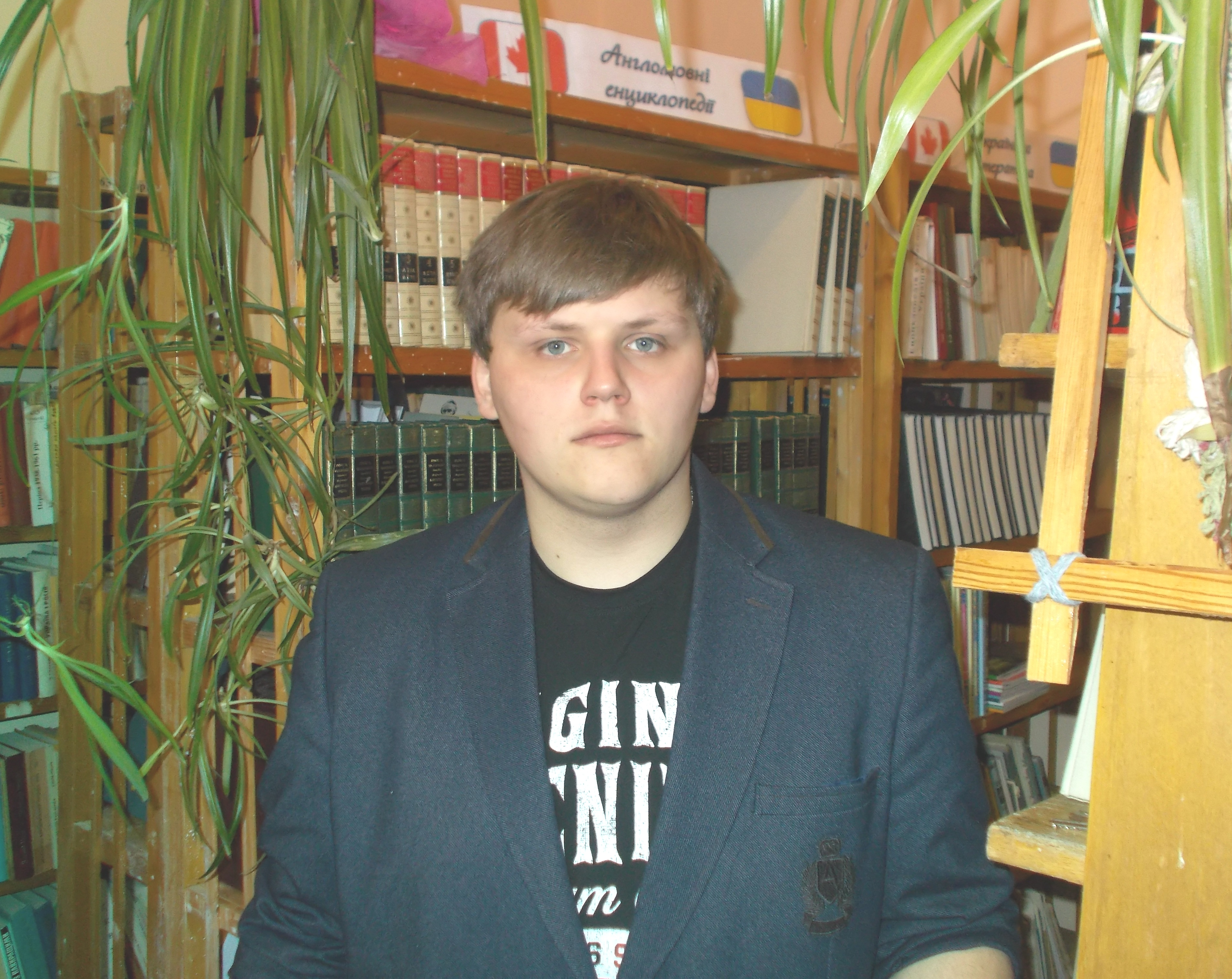 Іван Баран